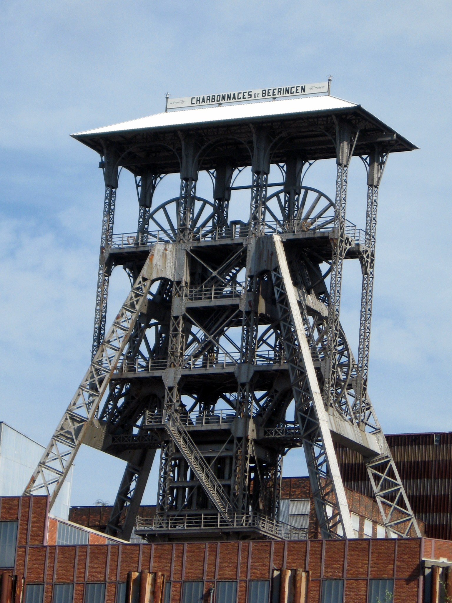 Noordelijke schachttoren van de Steenkoolmijn Beringen in Koersel